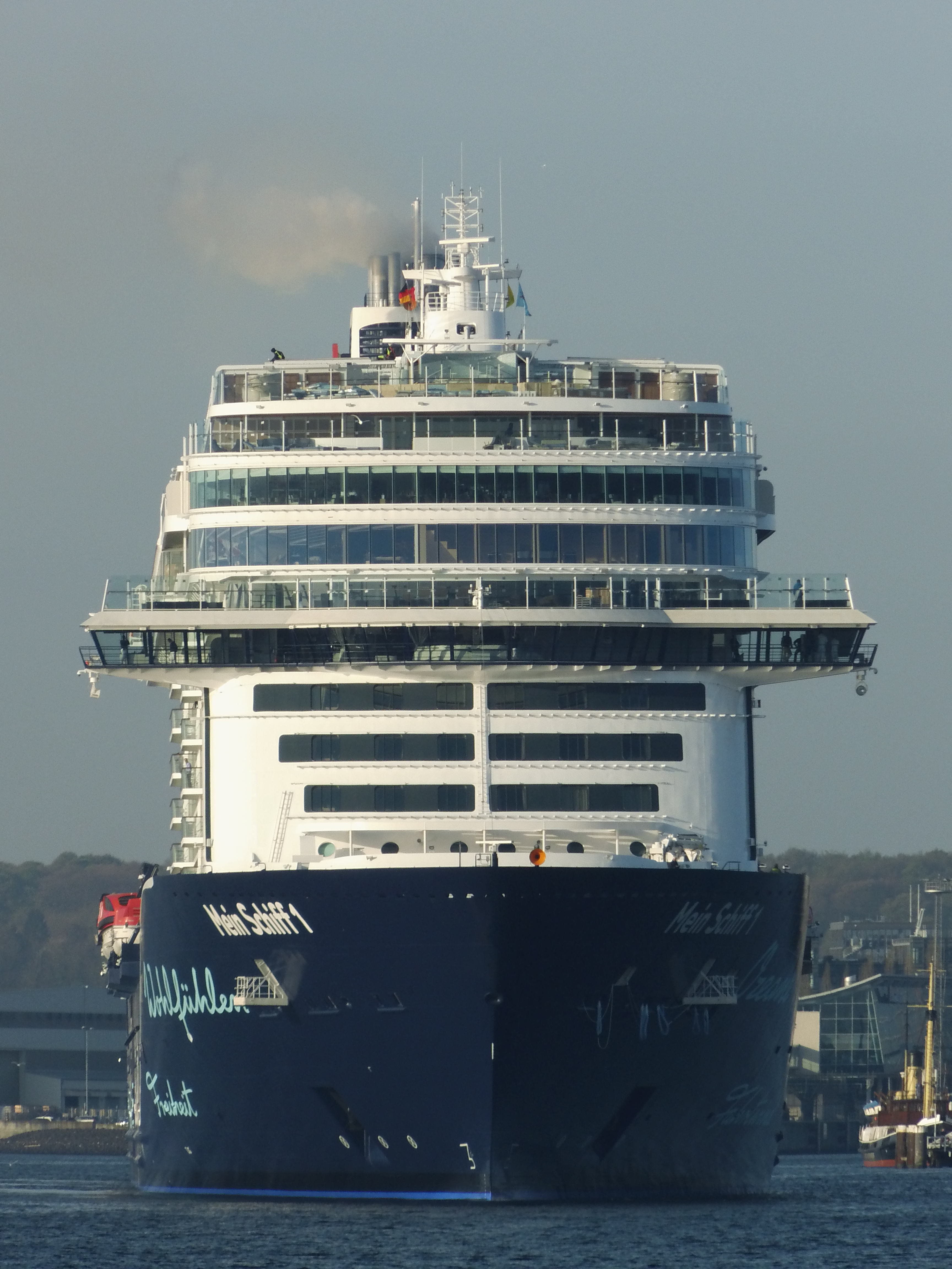 New Mein Schiff 1 in Kiel for the first time.